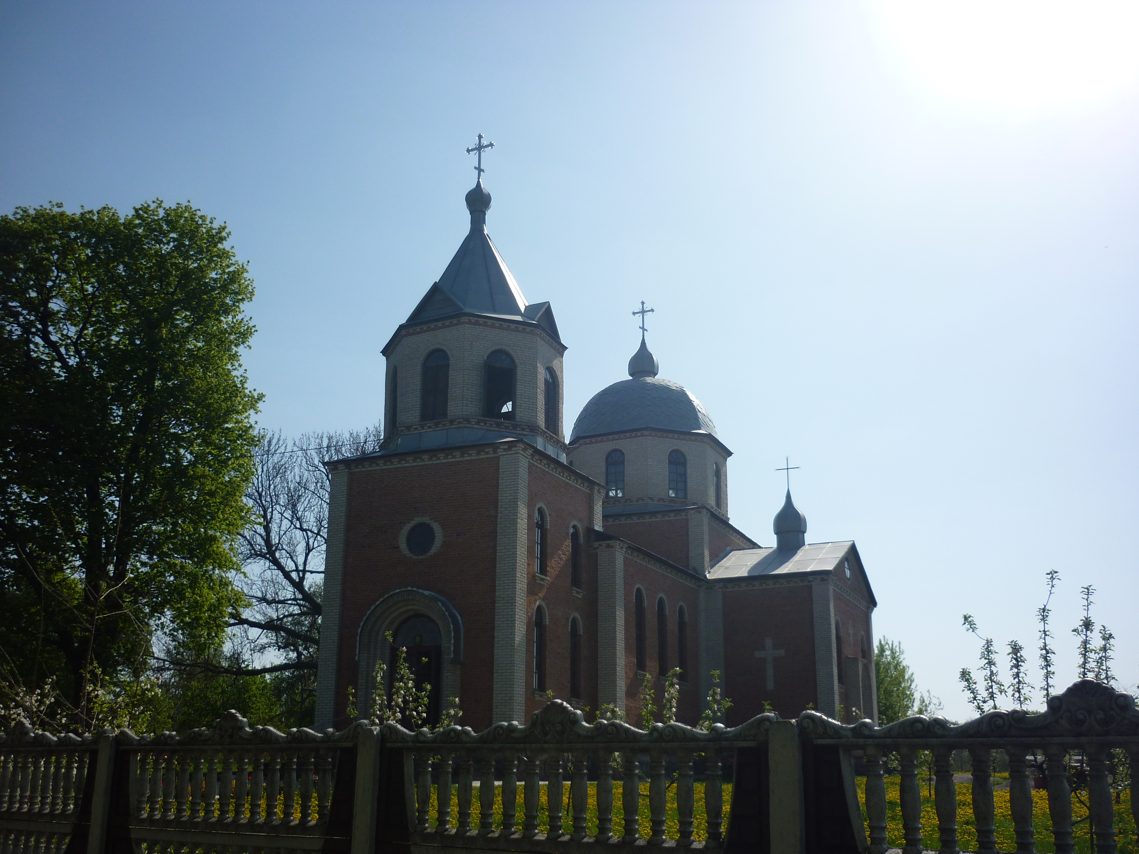 Церква в селі Краснопілка Гайсинського району